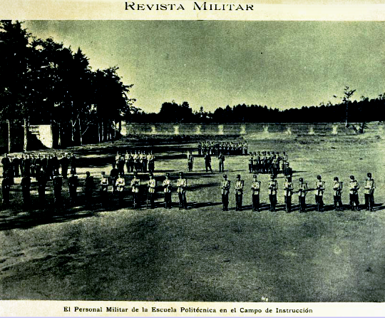 Primera sede de la Escuela Politécnica en el convento de la Recolección.